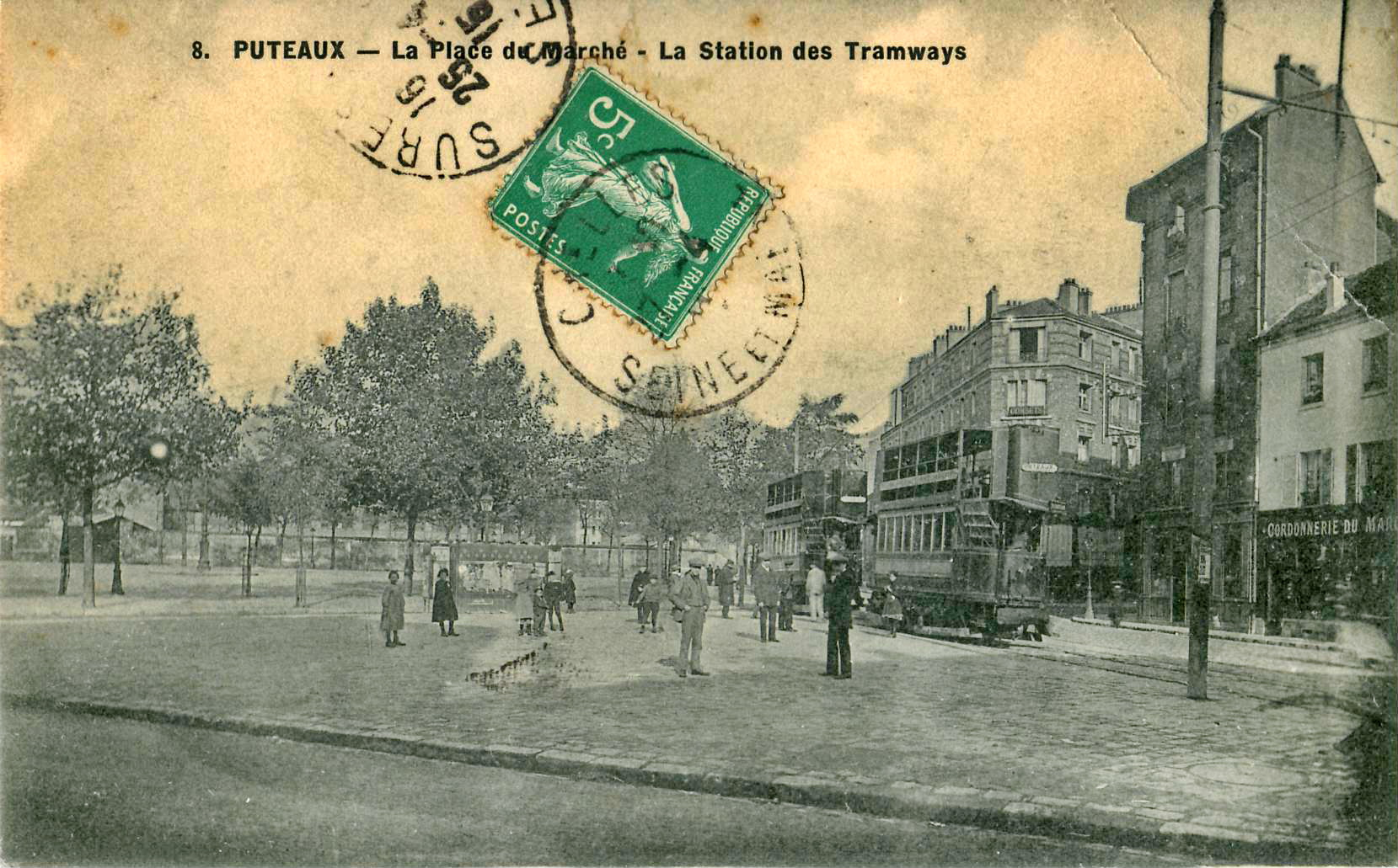 Carte postale sans mentuion d'éditeur, n°8 : PUTEAUX - La Place du Marché - La Station des Tramways